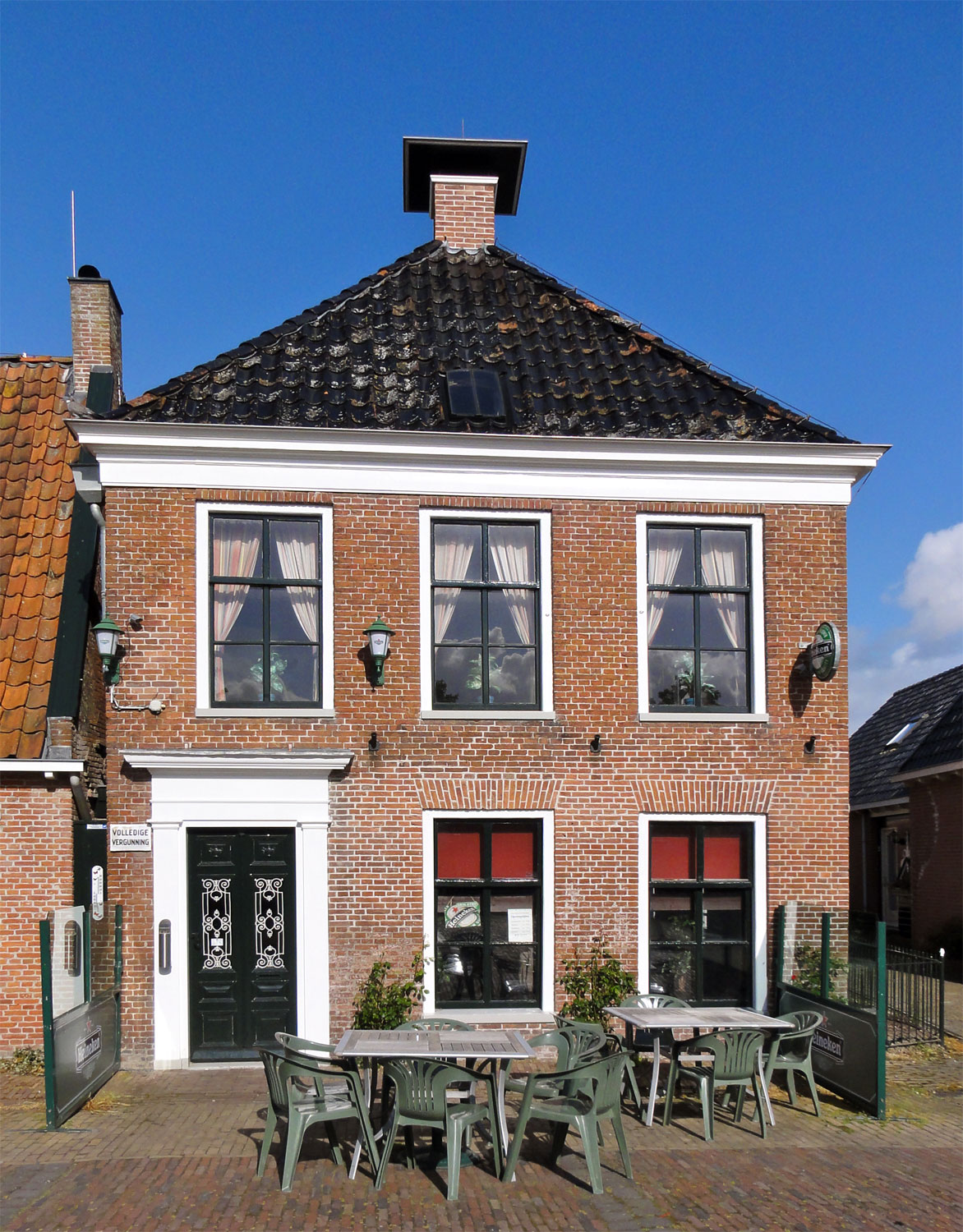 Hoofdstraat 3 in Blija